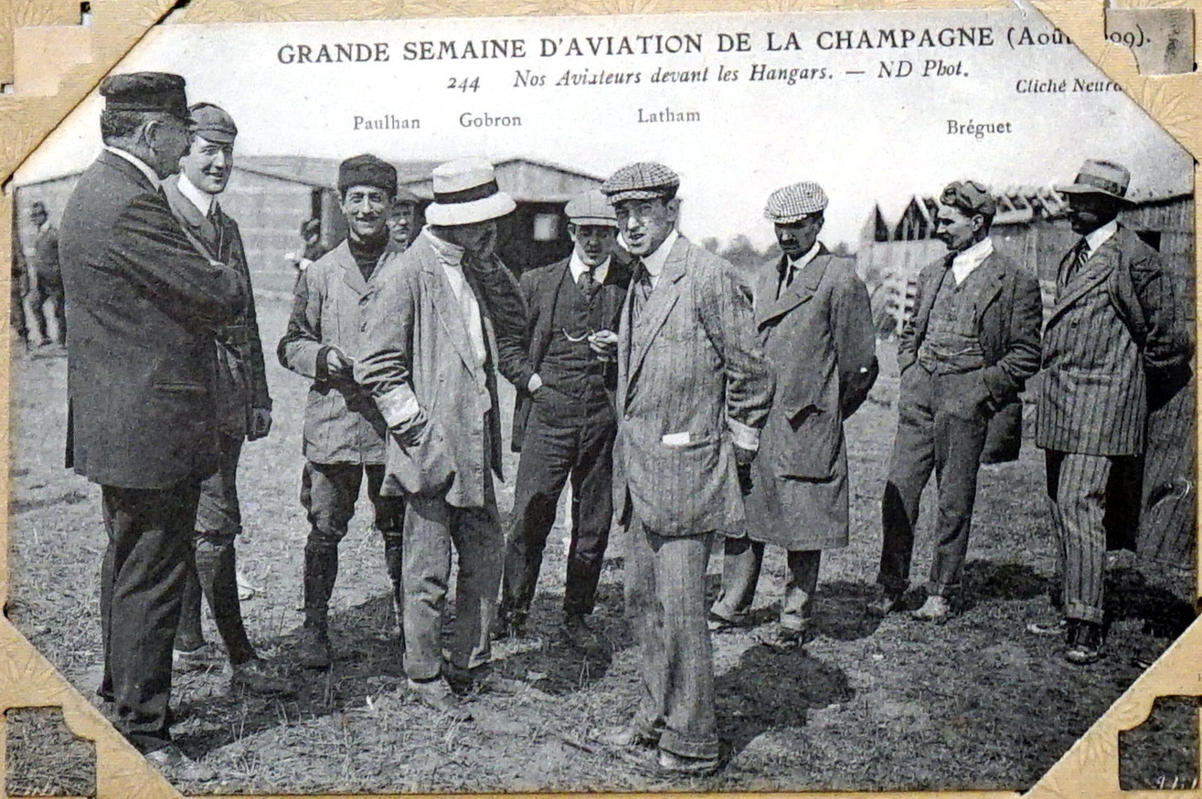 conservé en la B.M. de Reims.